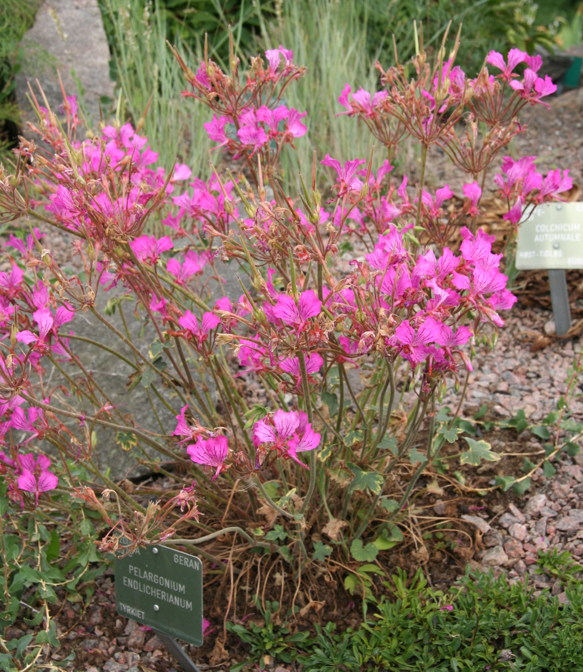 Pelargonium endlicherianum im Botanischen Garten Kopenhagen